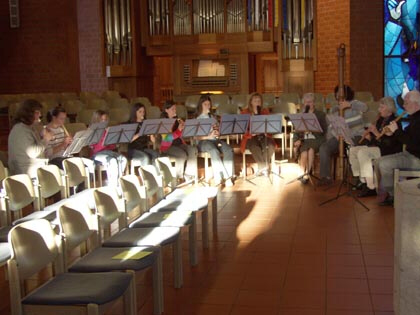 Die Emmauskirche in der Weststadt von Innen während der Weststadtwoche 2005, Braunschweig